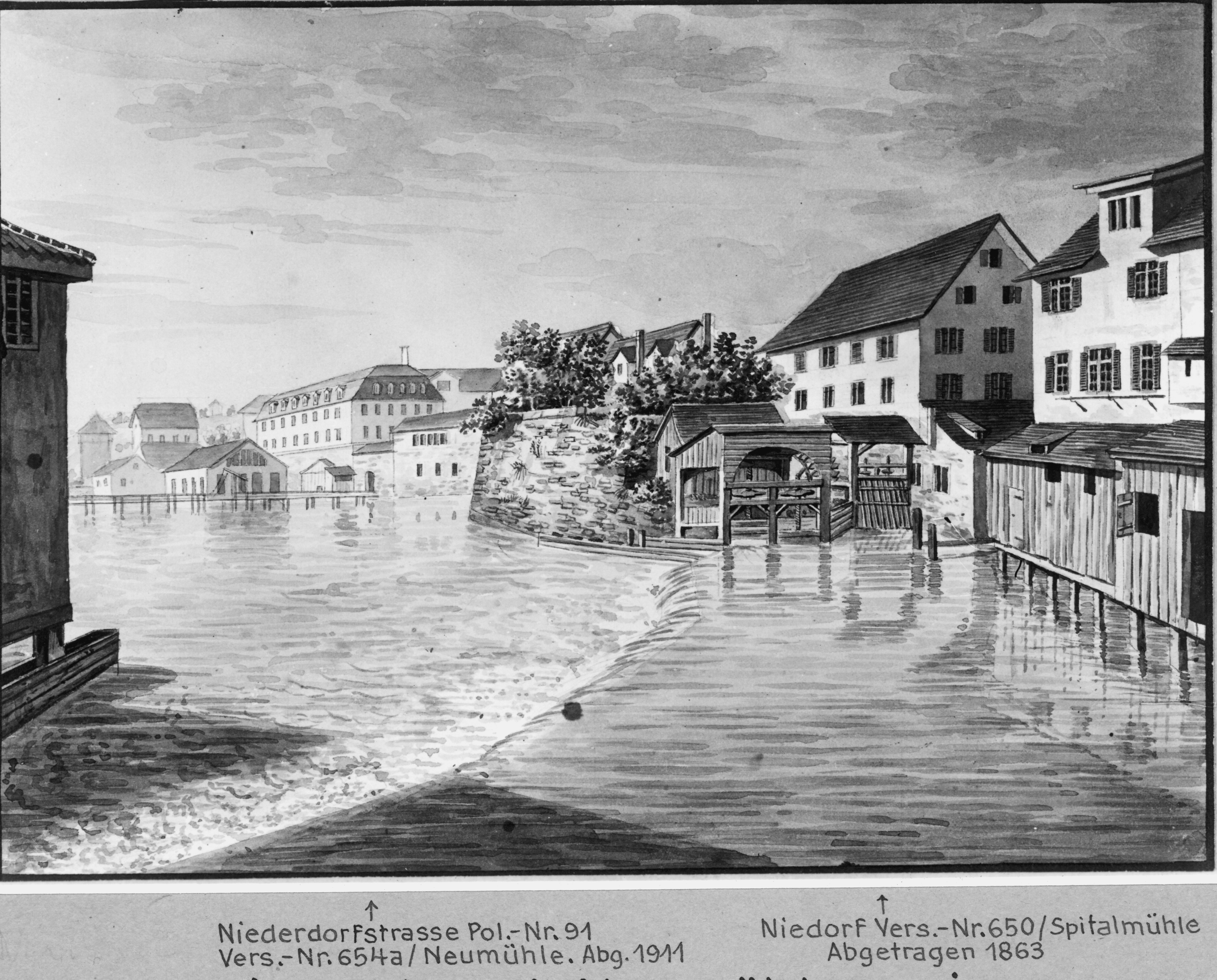 Spitalmühle Zürich, Schweiz, 1834, Abbruch 1863